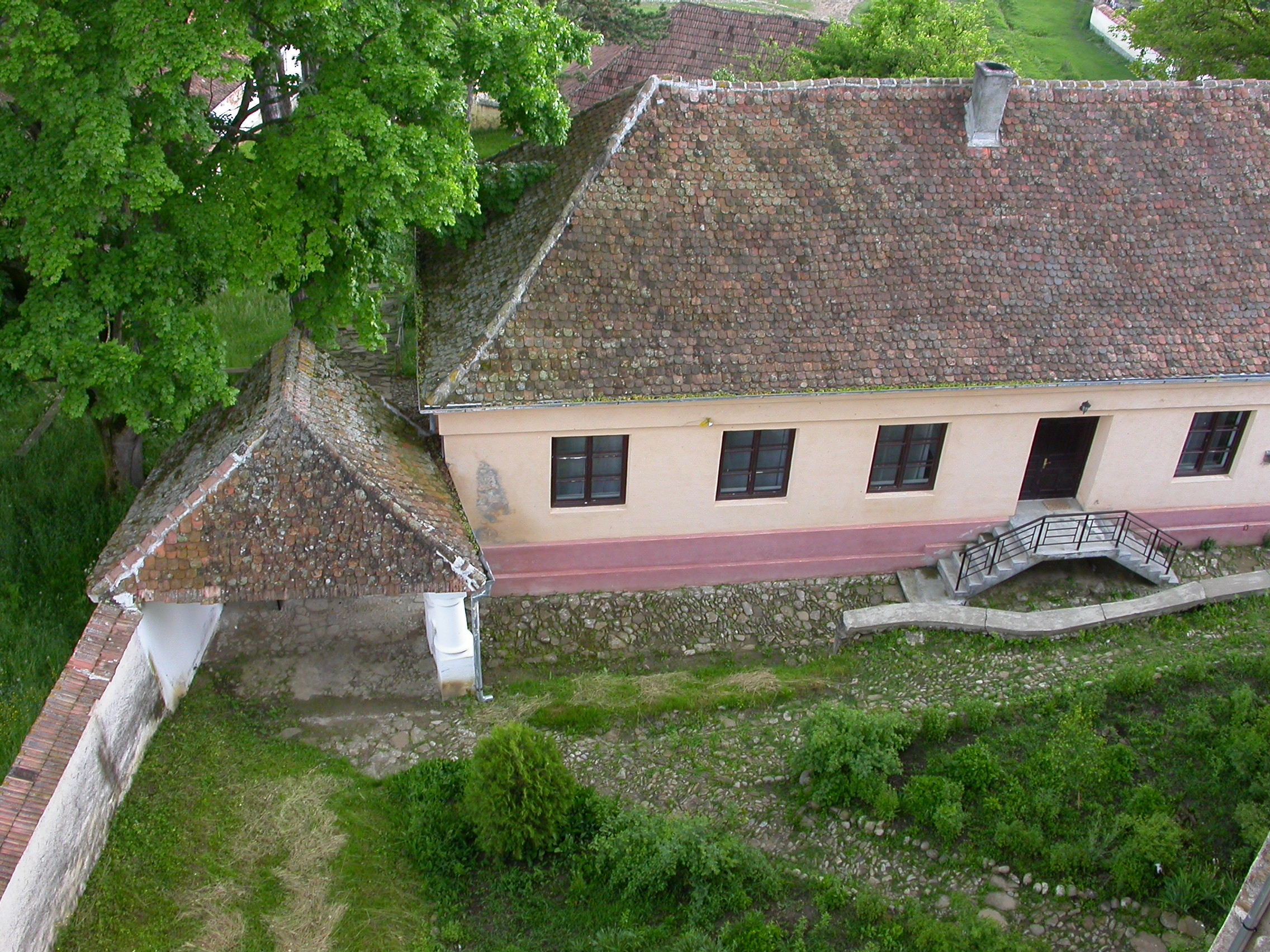 Ansamblul bisericii evanghelice fortificate, sec. XIV - XIX